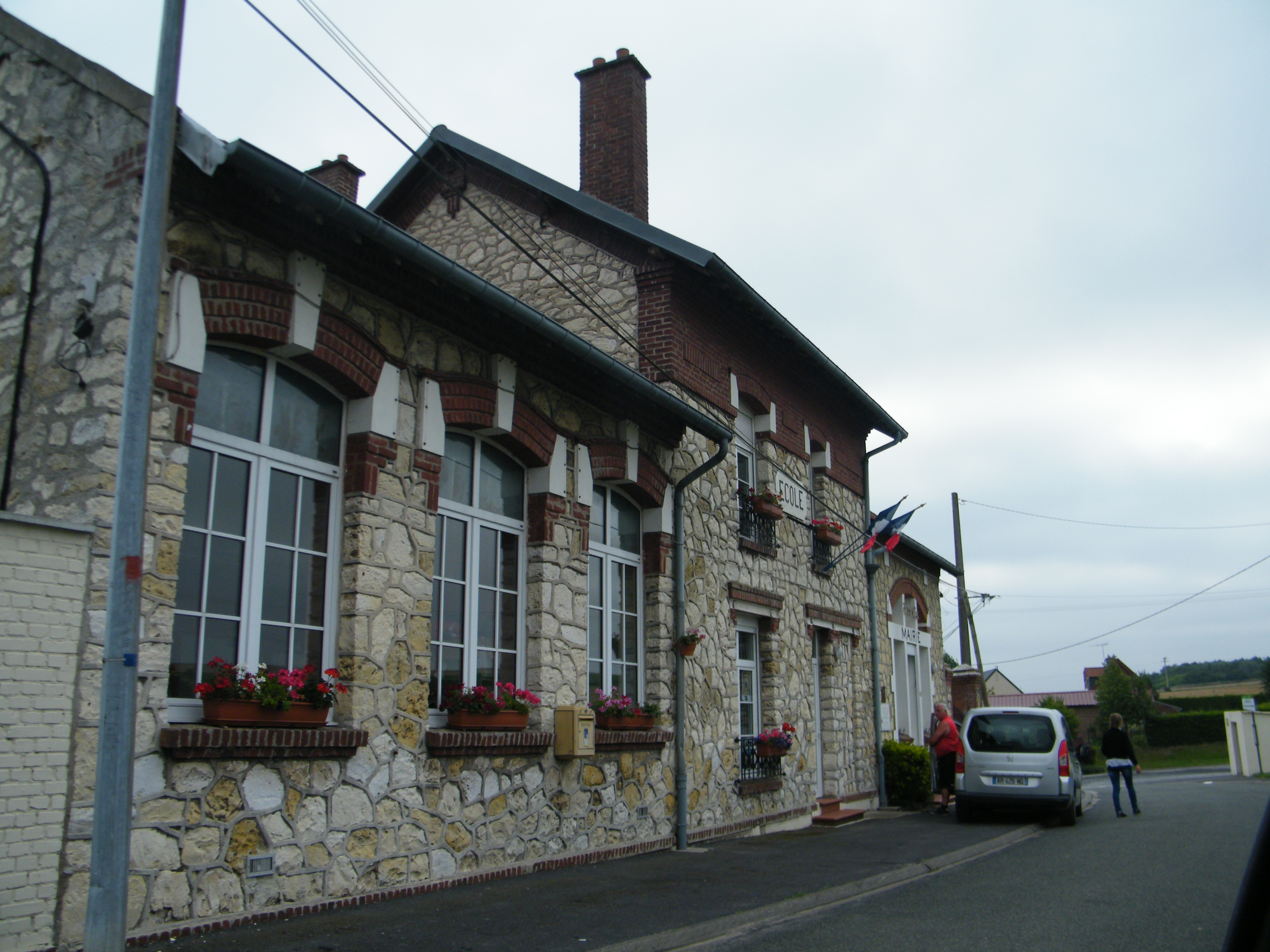 Mairie-école.